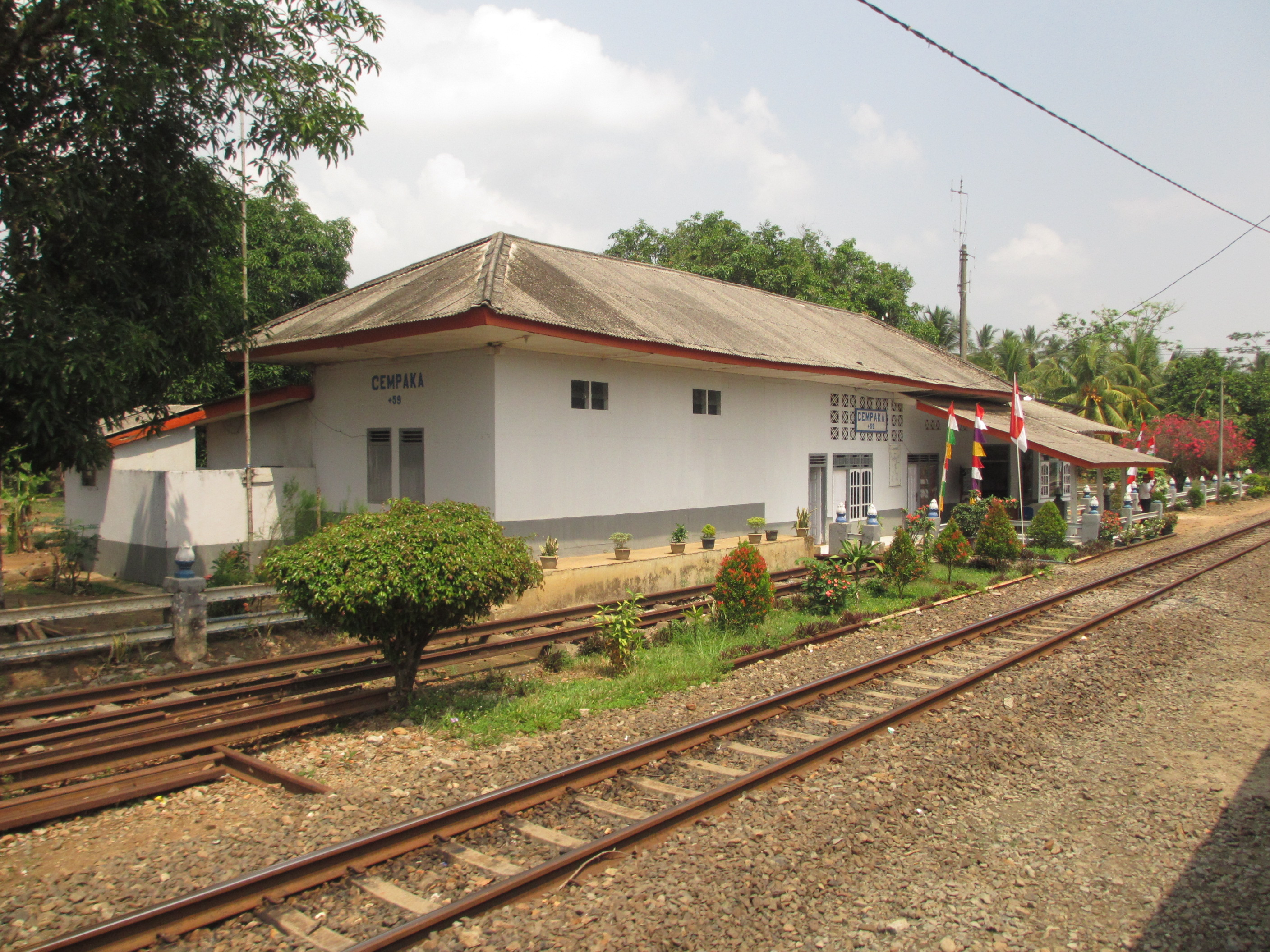 Stasiun Cempaka.